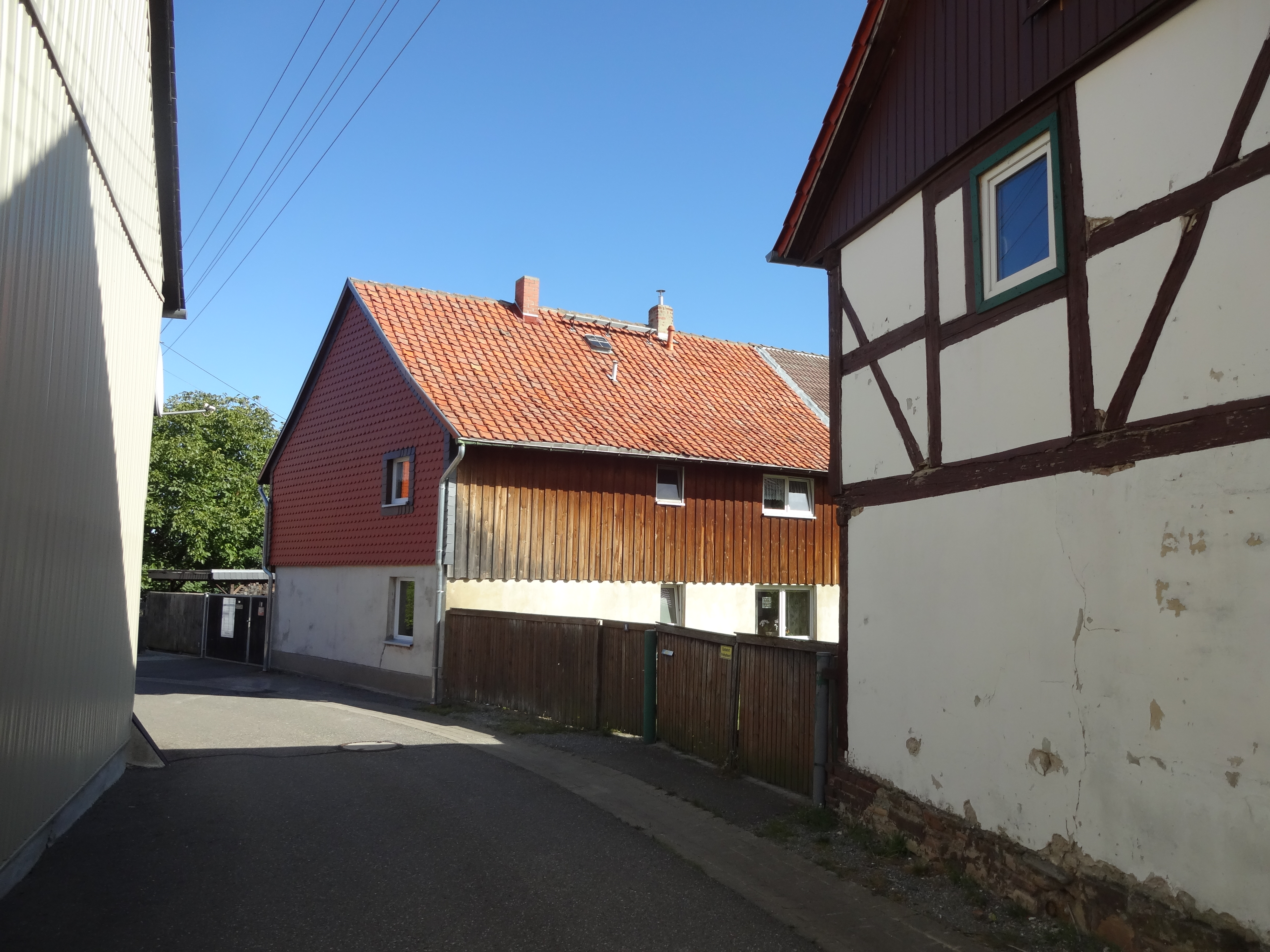 Bauernhaus in der Backhausgasse 6 in Drübeck; das Bauernhaus war denkmalgeschützt